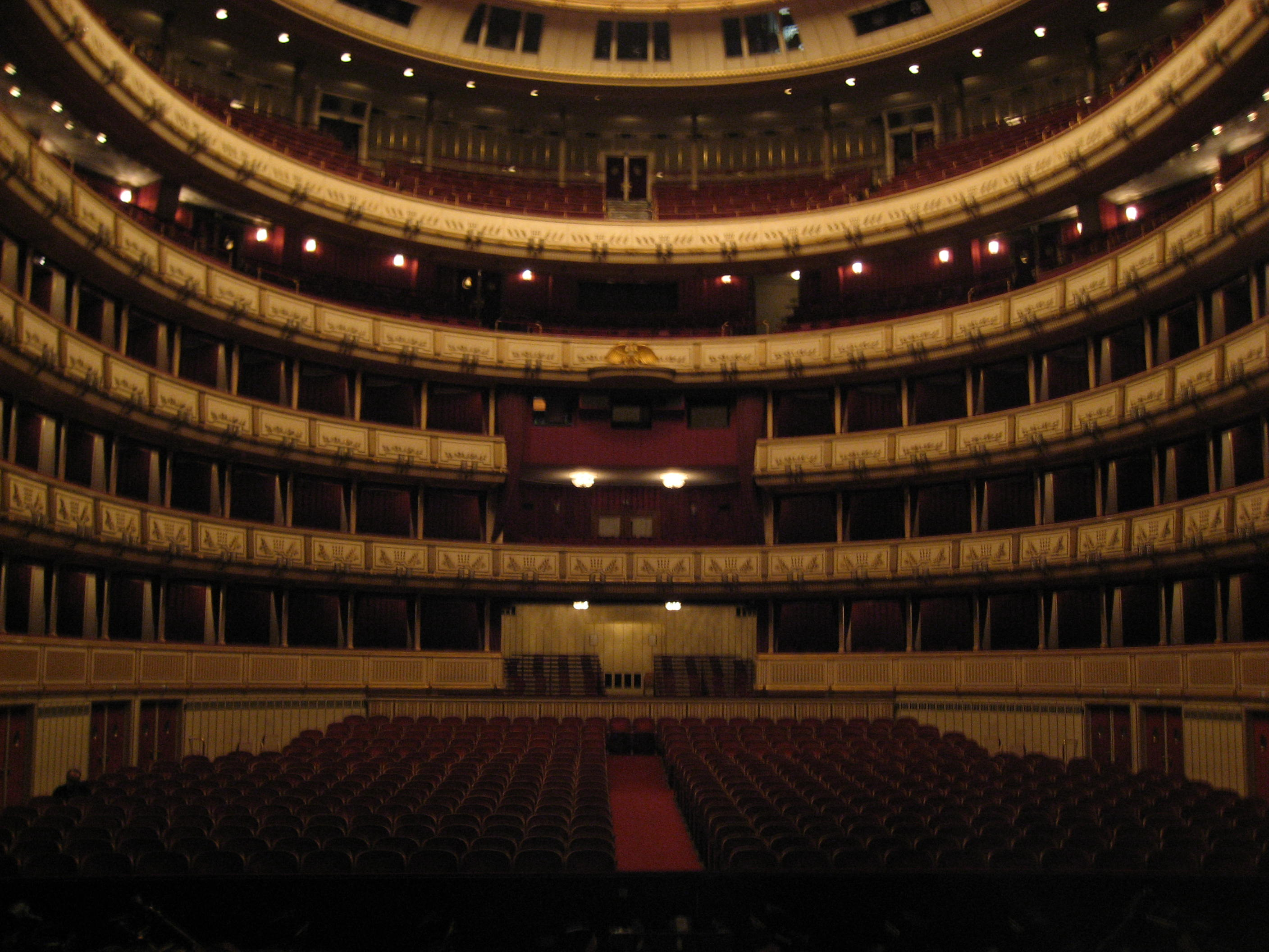 Wiener Staatsoper